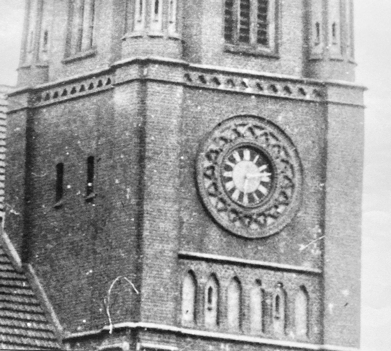 Westliches Zifferblatt der Christuskirche, Foto um 1905.